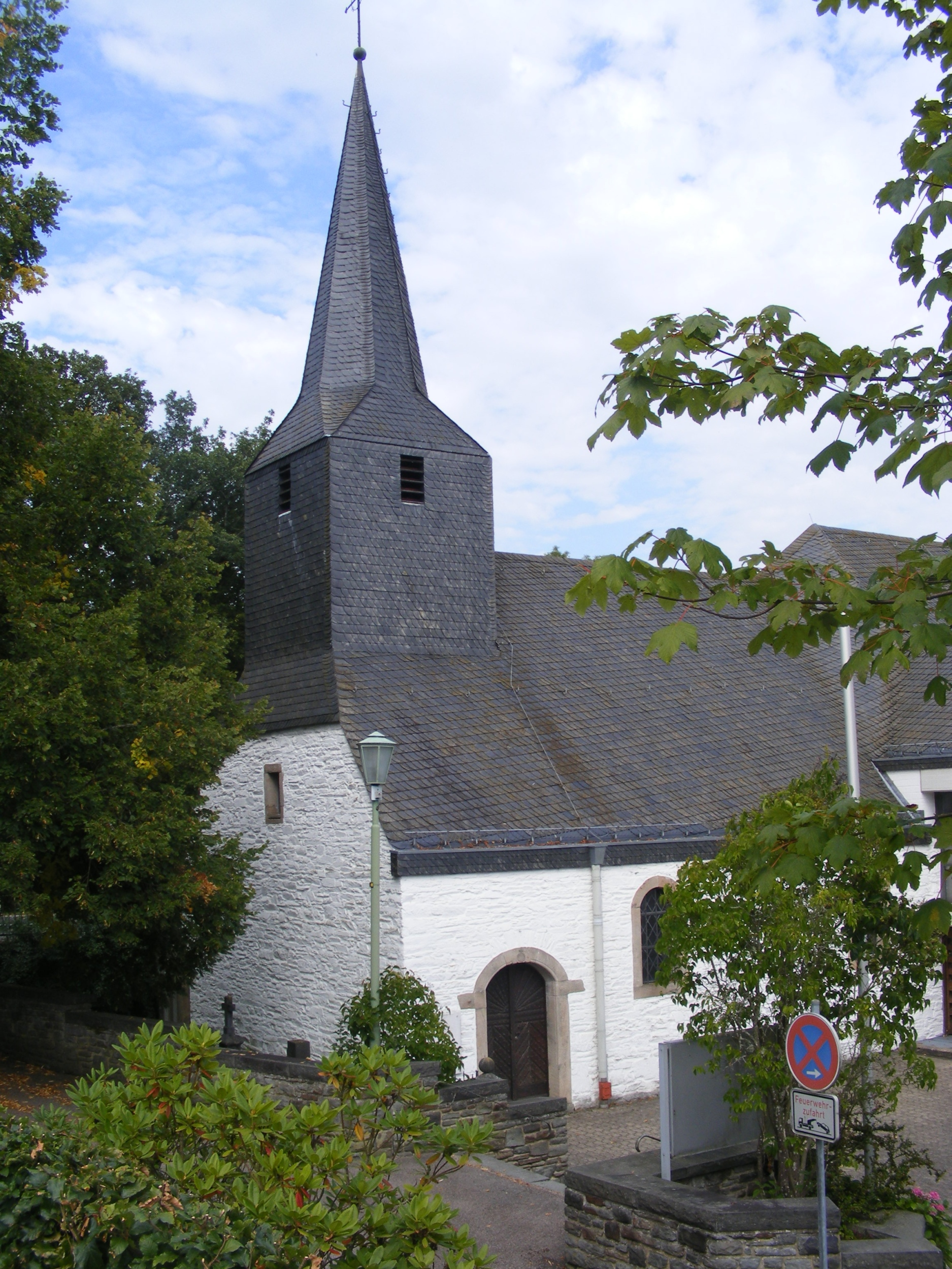 Simmerath Dedenborn KircheThis is a photograph of an architectural monument., no. 56